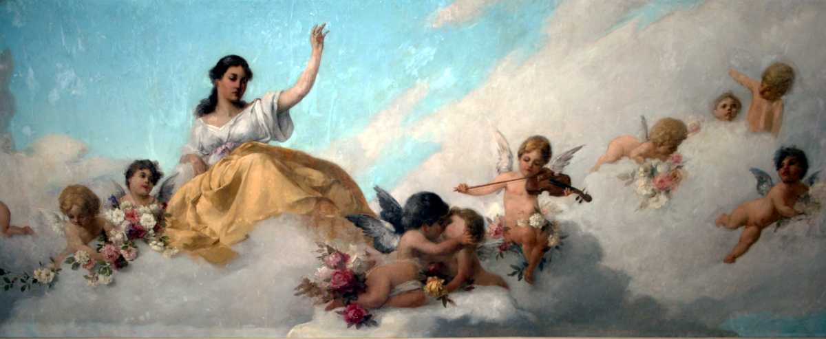 Alegorija, rad Ferde Kovačevića u Hrvatskom institutu za povijest u Zagrebu